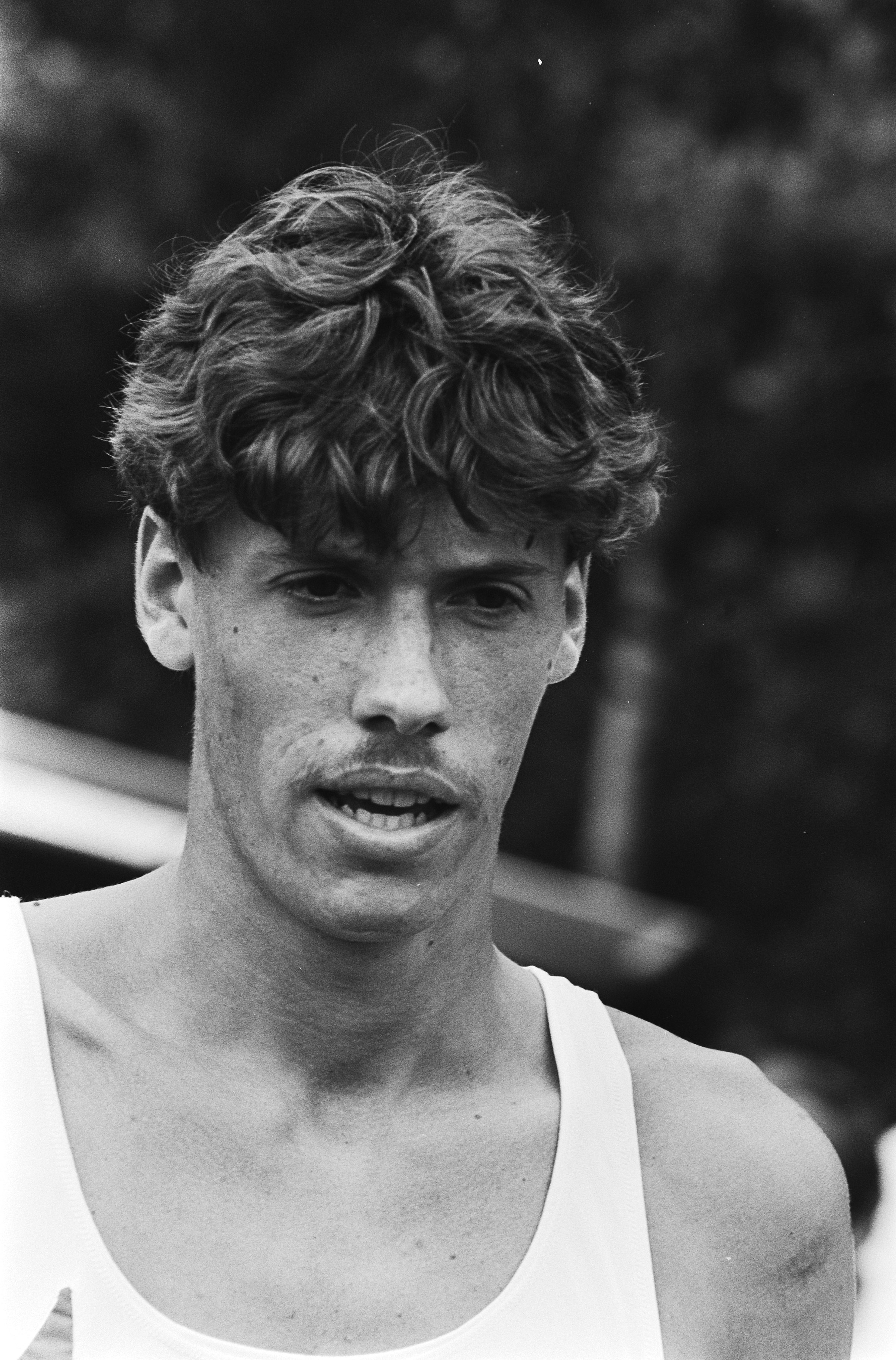 Collectie / Archief : Fotocollectie Anefo Reportage / Serie : Nederlandse Atletiekkampioenschappen te Vught Beschrijving : Rob Druppers, middellange afstandsatleet Datum : 22 juli 1983 Locatie : Noord-Brabant, Vught Trefwoorden : atletiek, portretten, wedstrijden Persoonsnaam : Druppers, Rob Fotograaf : Bogaerts, Rob / Anefo Auteursrechthebbende : Nationaal Archief Materiaalsoort : Negatief (zwart/wit) Nummer archiefinventaris : bekijk toegang 2.24.01.05 Bestanddeelnummer : 932-6557